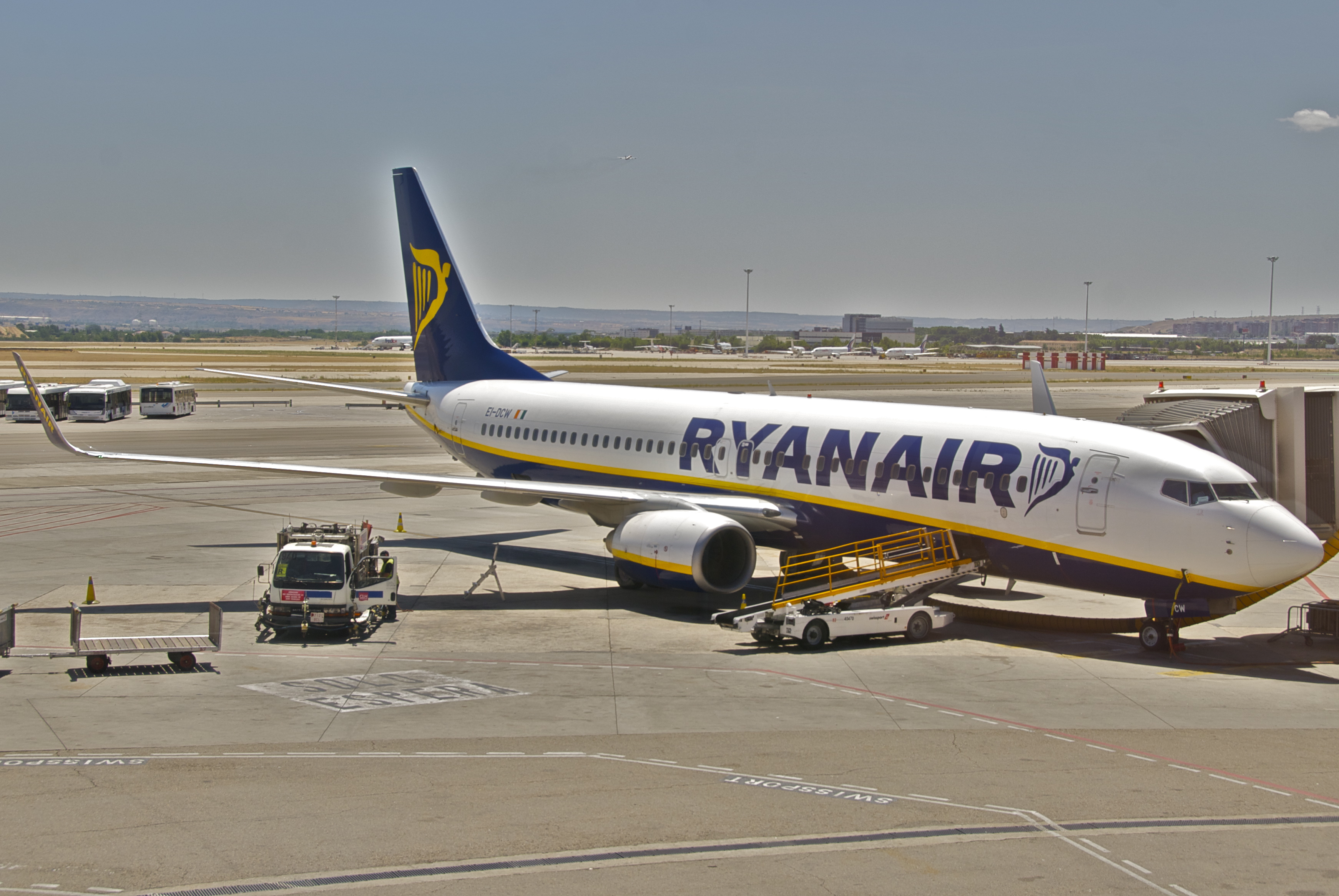 Ryanair Boeing 737-800; EI-DCW@MAD;30.06.2012/658cl